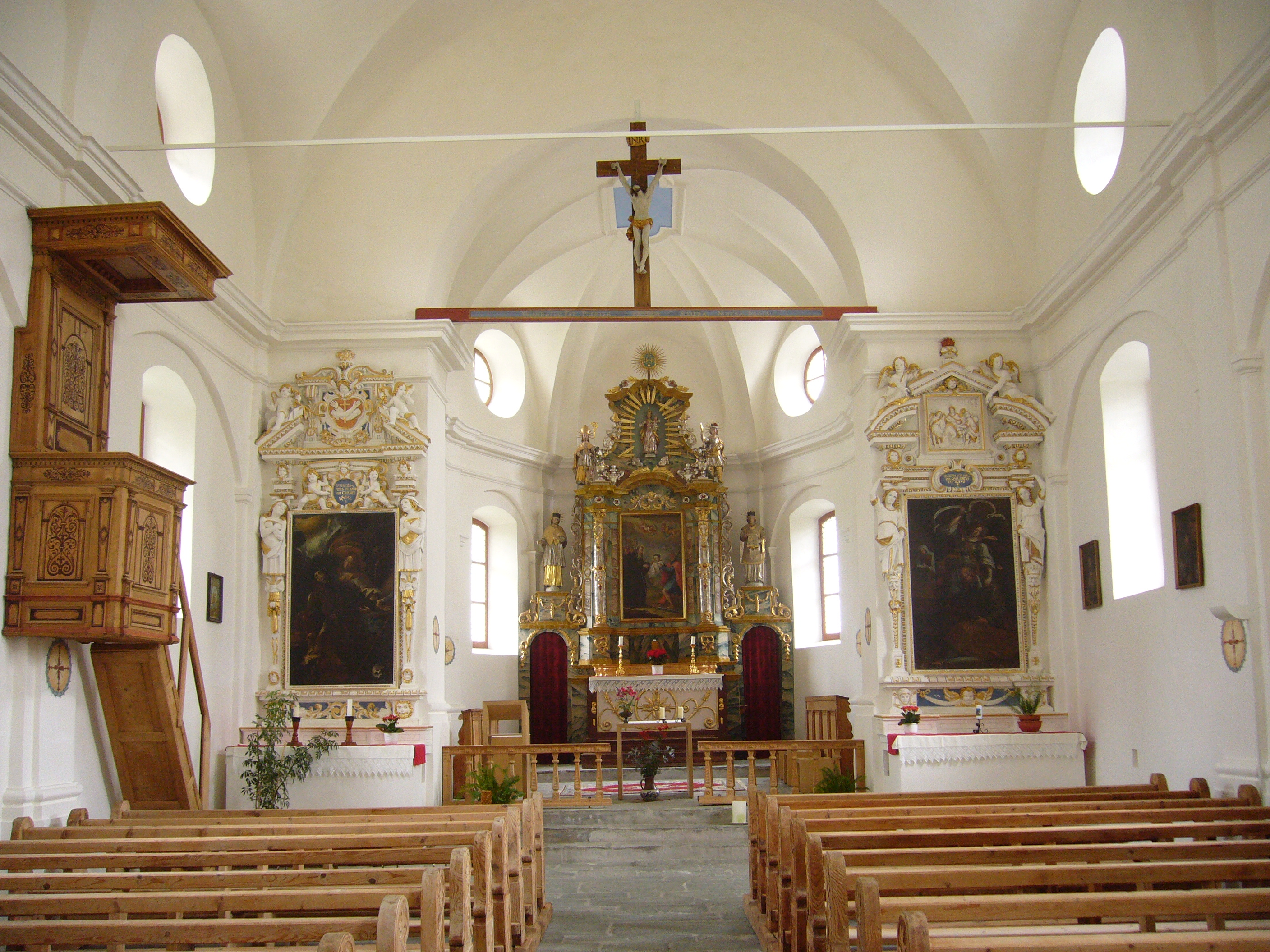 Innenansicht der St. Placiduskirche in Disentis (Schweiz)